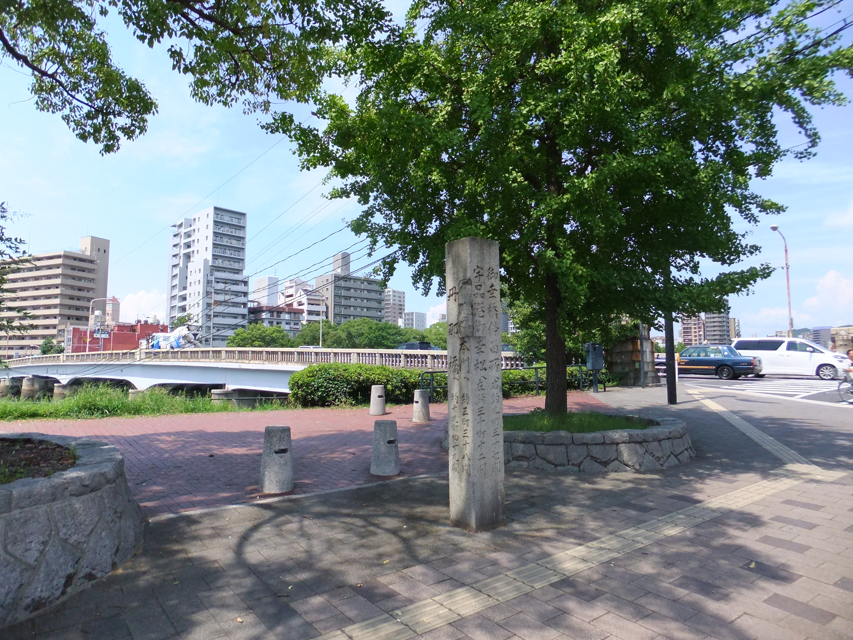 比治山橋 横の石碑